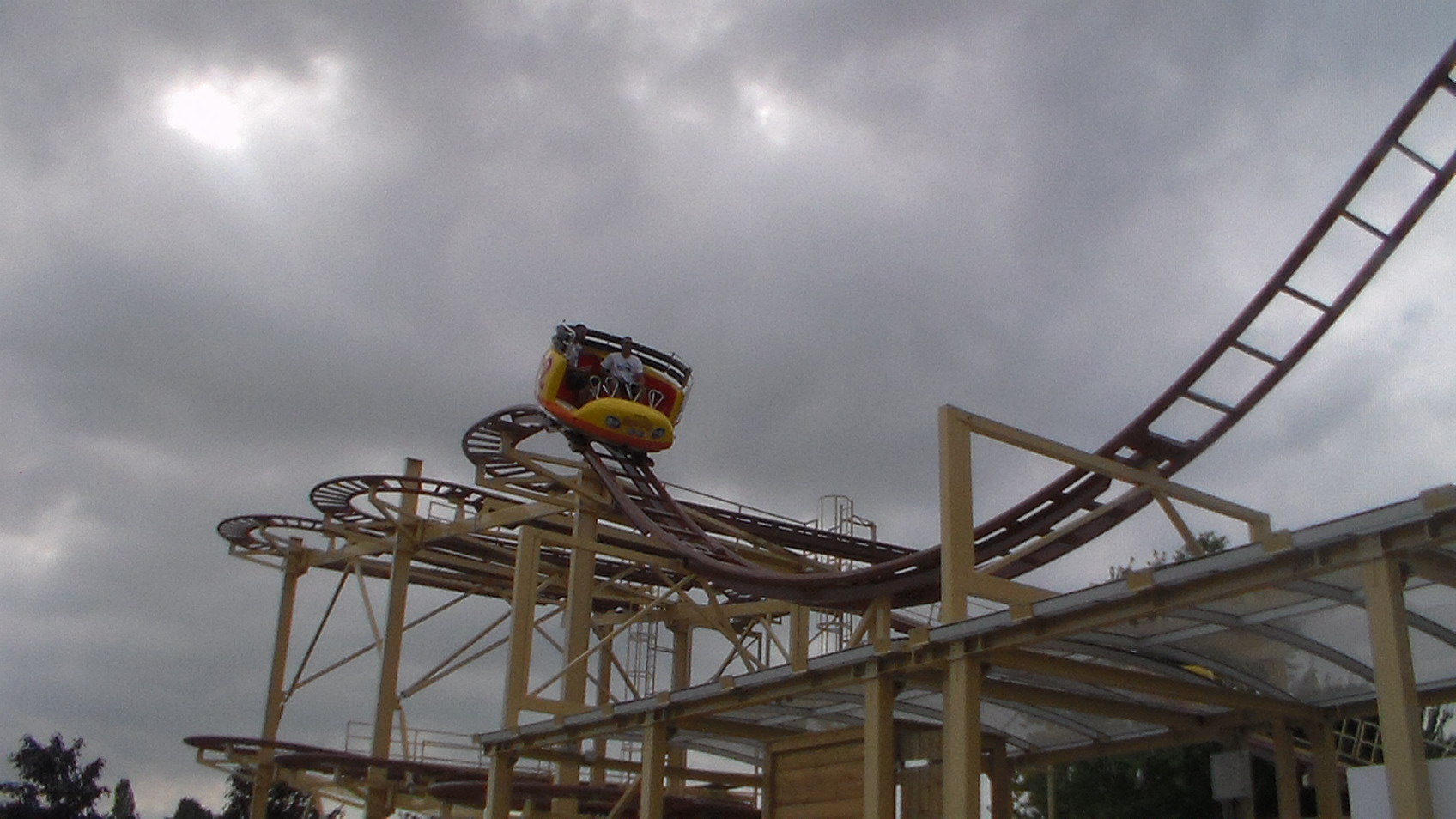 Jurassic Coaster